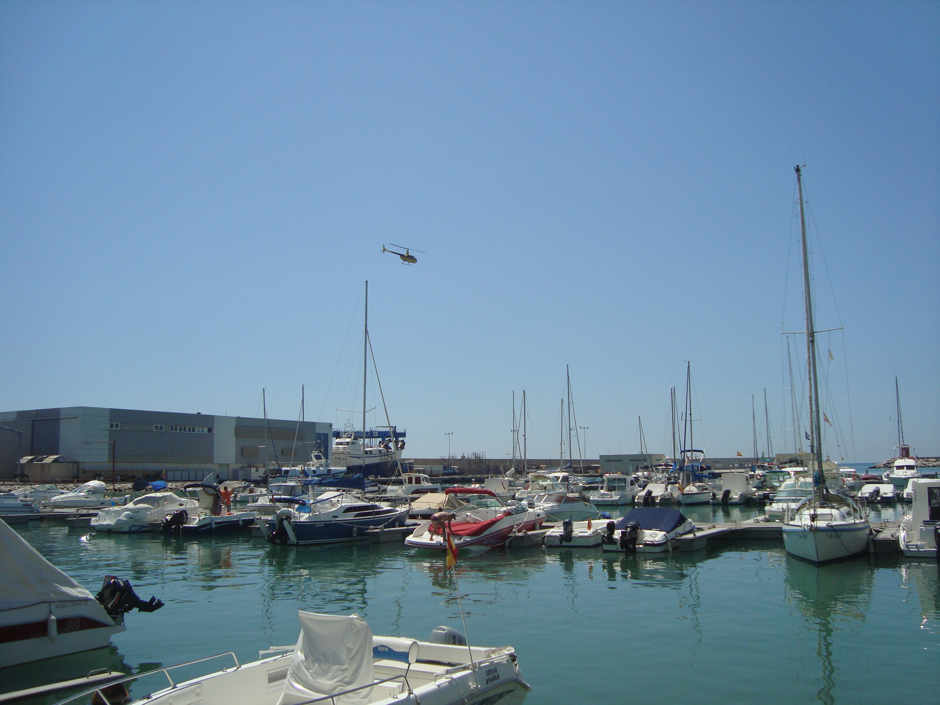 Port Naútic de Benicarló